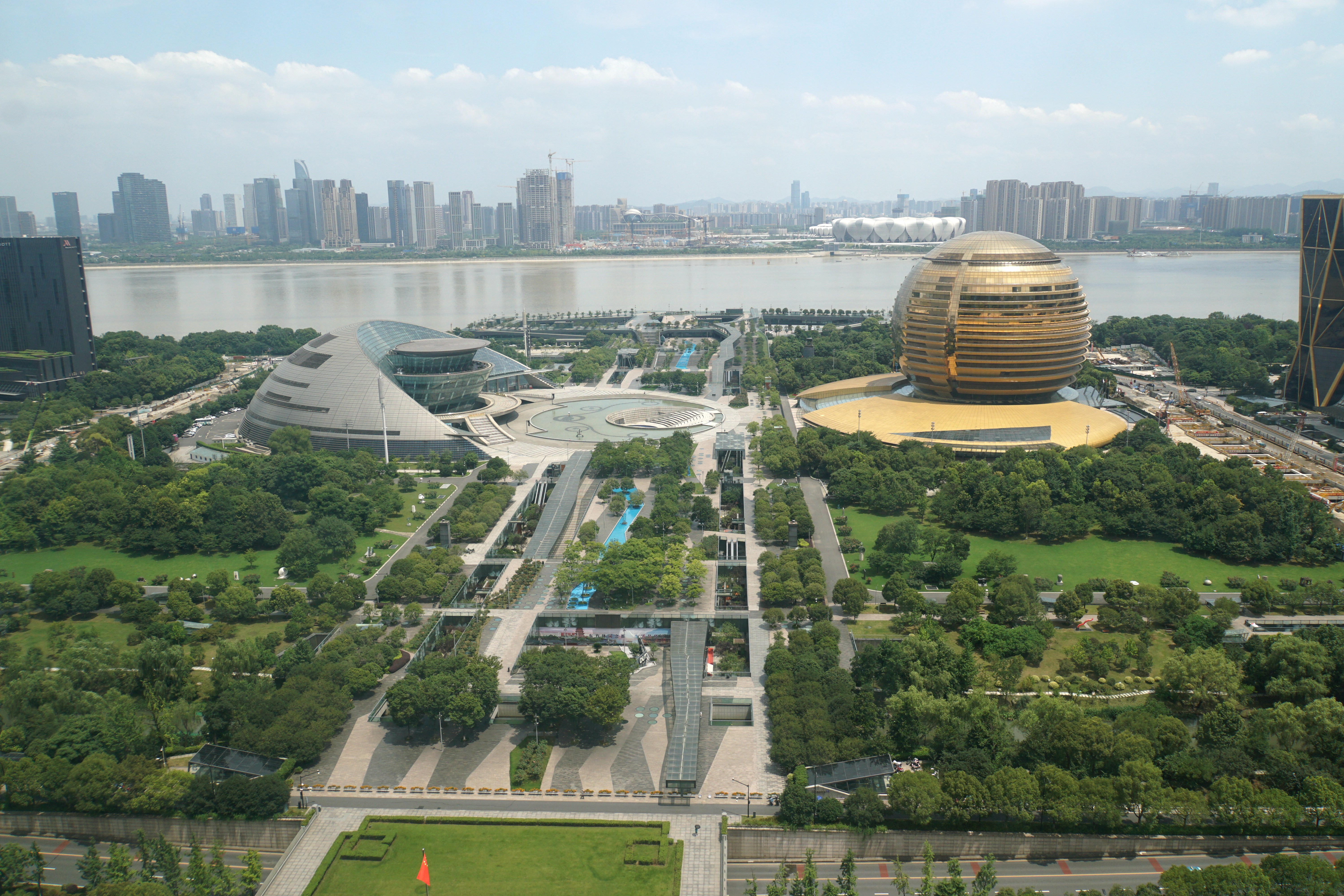 从市民中心观看波浪文化城